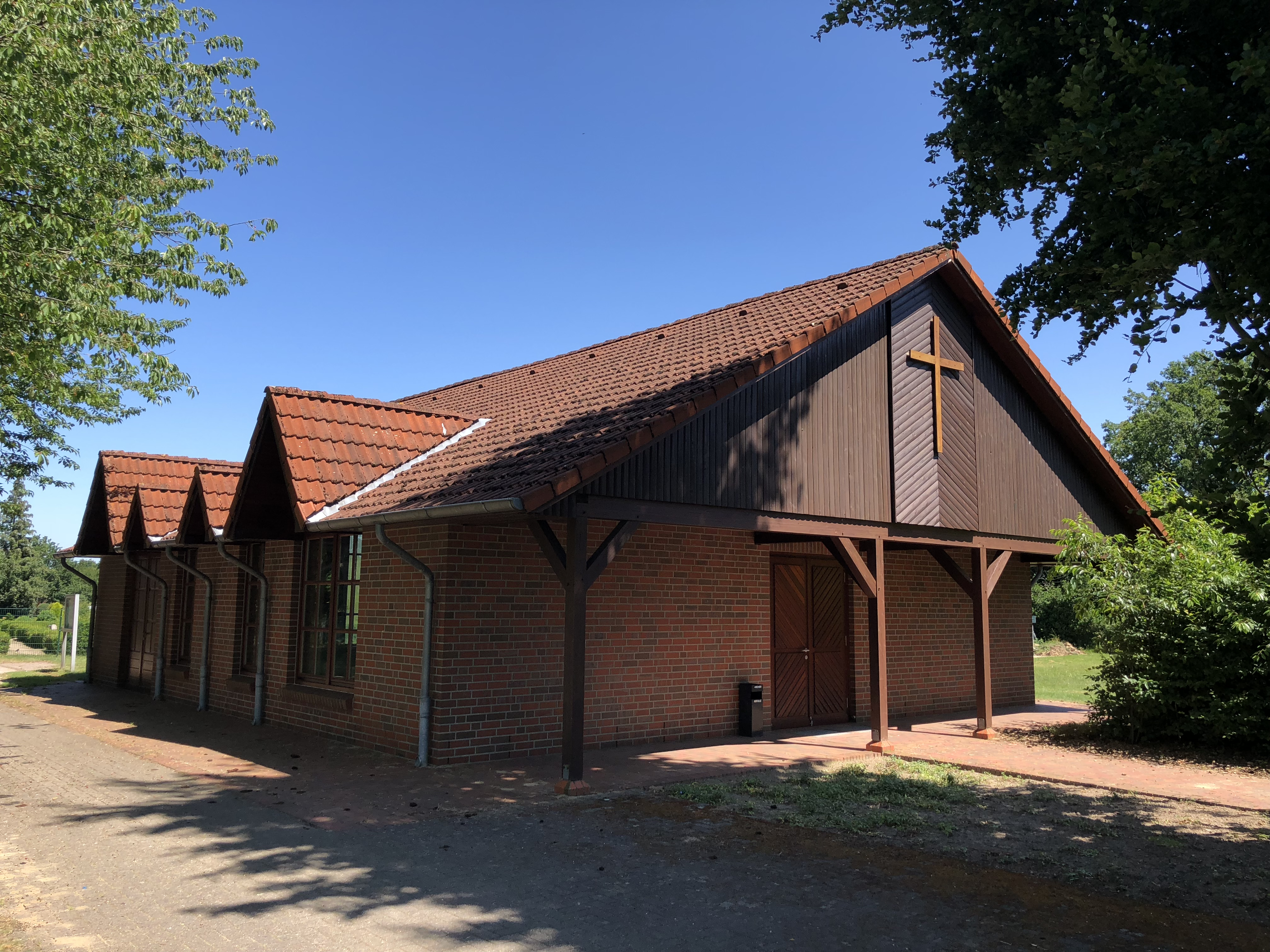 Kapell bi’n Karkhoff in Wiegersen